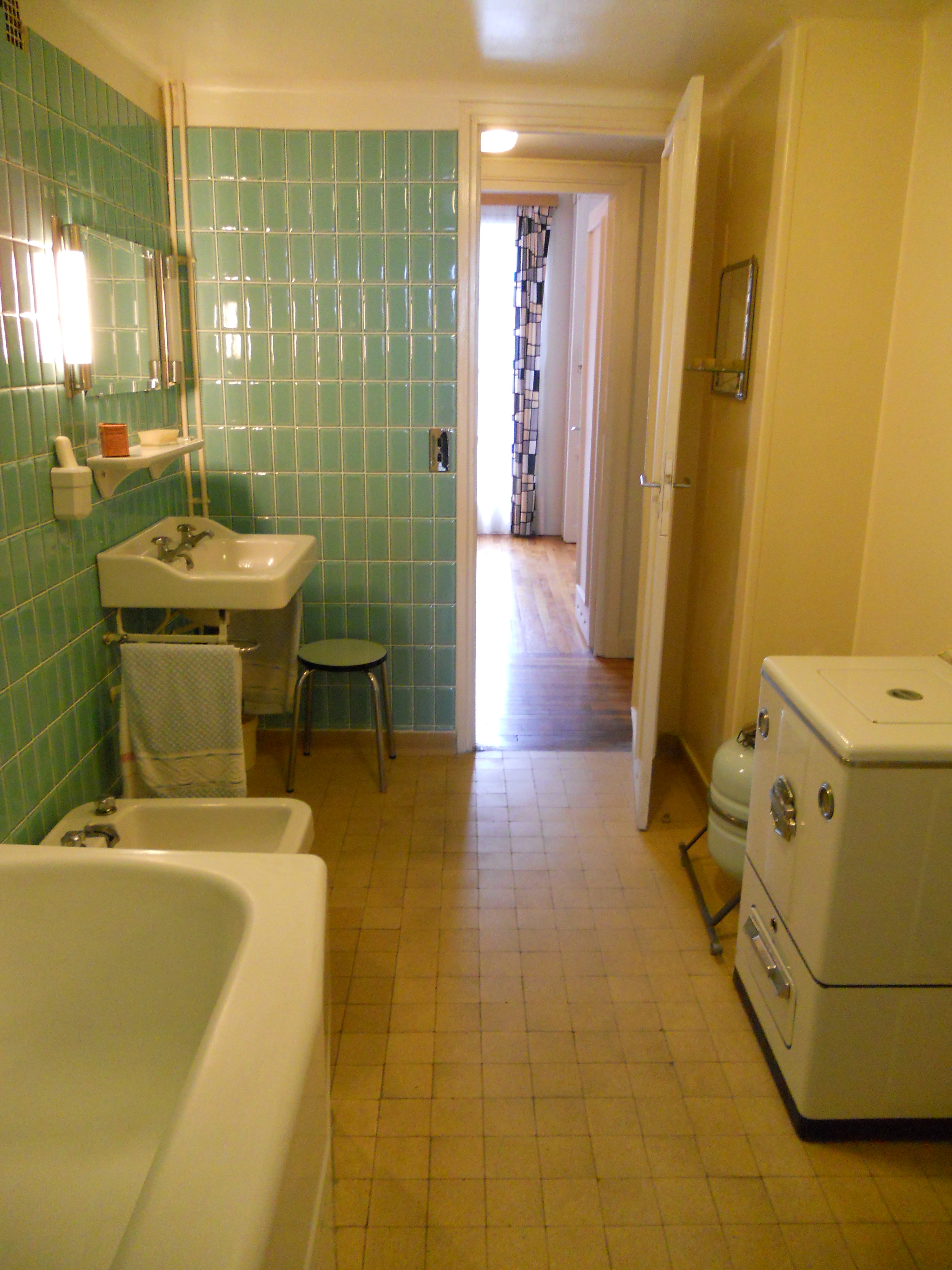 Salle de bain de l'appartement témoin Perret au Havre . Elle est composé de meuble BLOCO de 1945 dans le " style reconstruction " ( comparable au Style 58 en Belgique ) . Cette pièce de court séjour , dépourvue de toute fenêtre et basse de plafond pour faire passer le chauffage à air pulsé et les gaines de ventilations , mesure 6 m² et donne accès au couloir central , à la chambre "des parents" et au bureau .